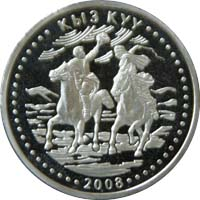 Памятная монета Республики Казахстан "Кыз куу" из серии «Национальные обряды и игры» - 50 тенге - реверс